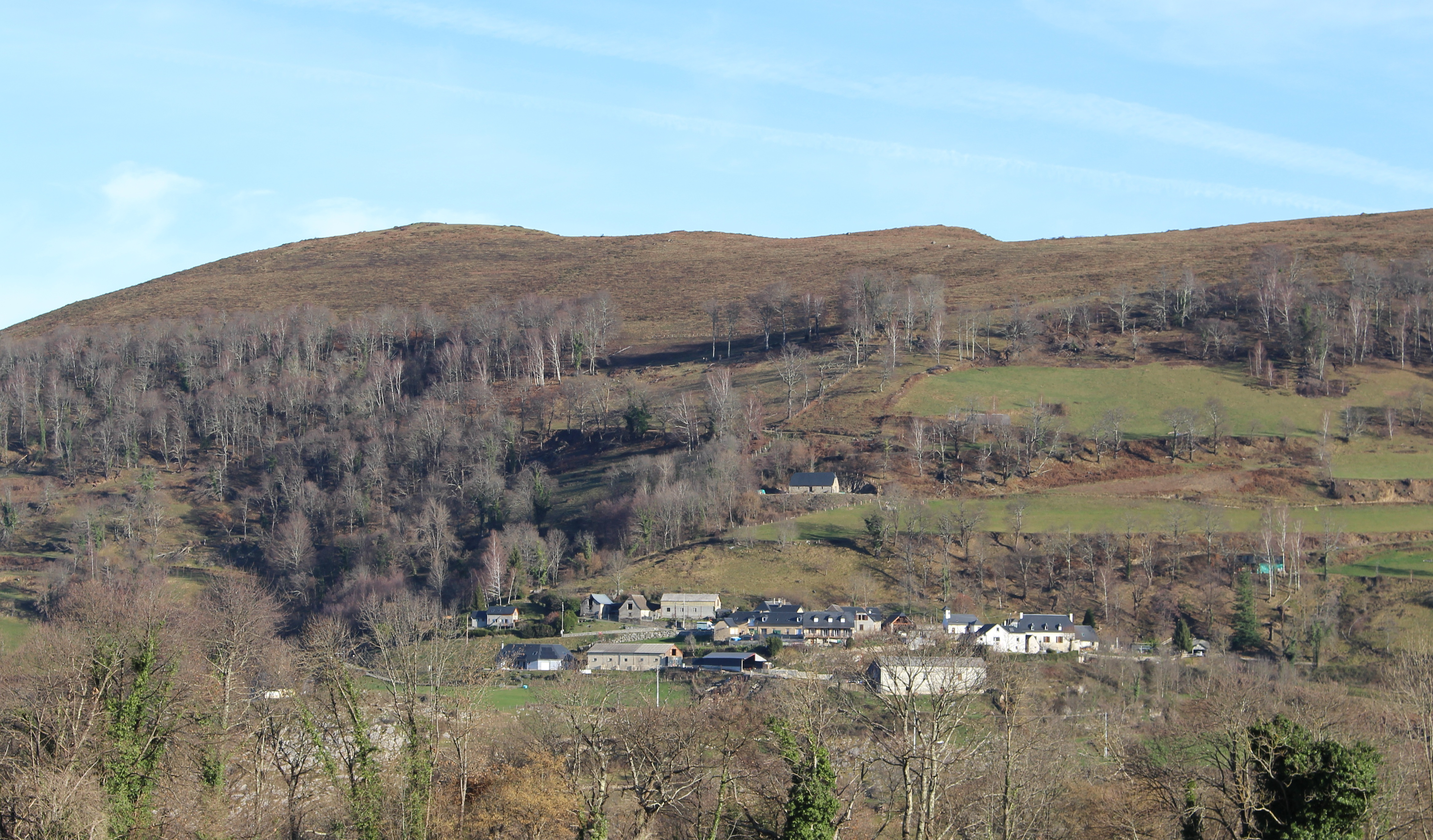 Justous (Hautes-Pyrénées)